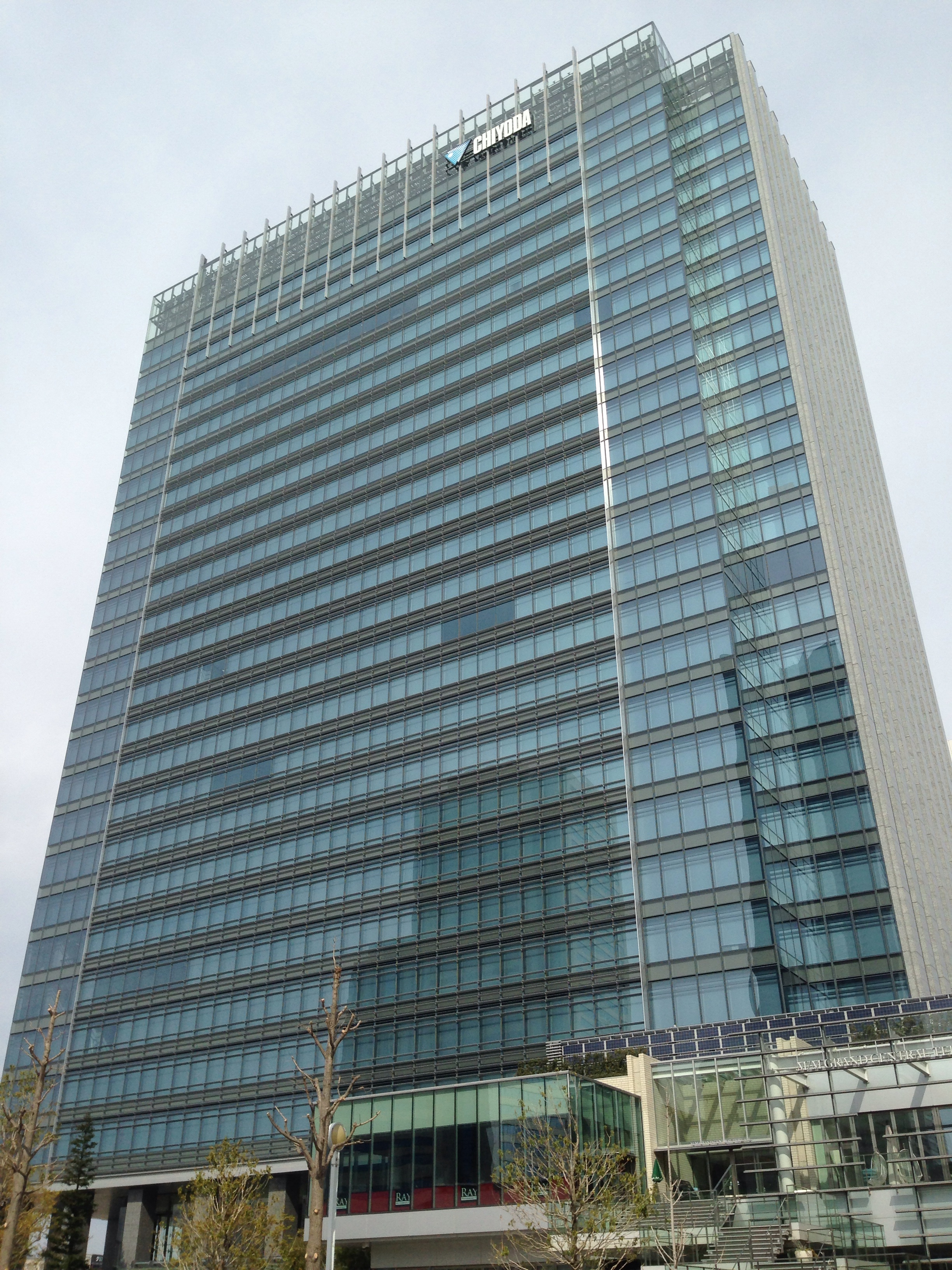 横浜みなとみらい地区（42街区）のオフィスビル「みなとみらいグランドセントラルタワー」（南東側）。